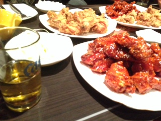 한국식 통닭